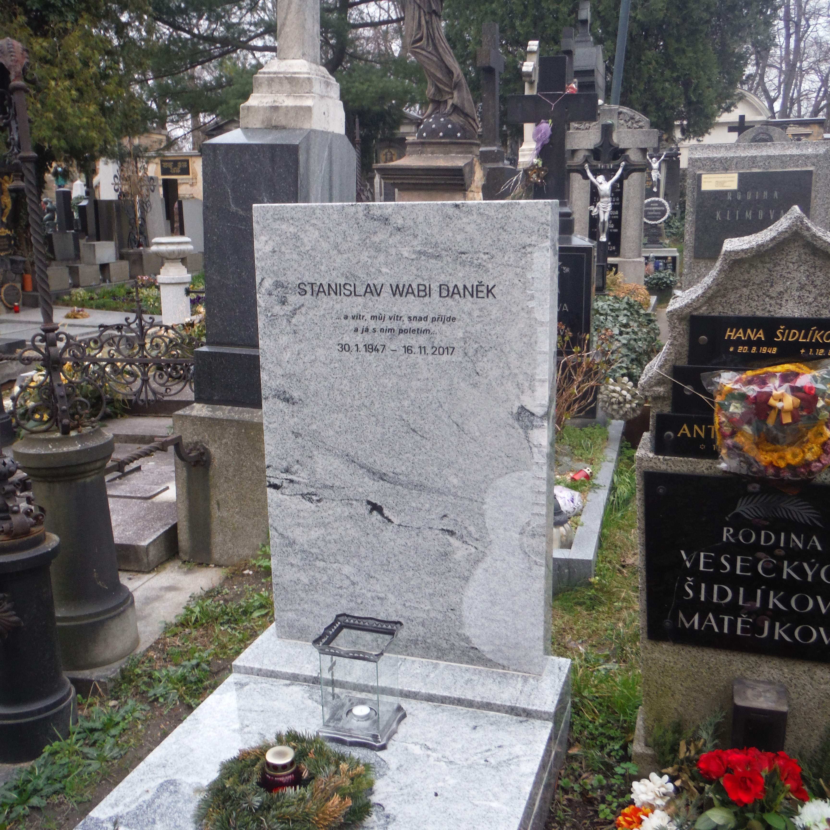 HROB NA VYŠEHRADĚ